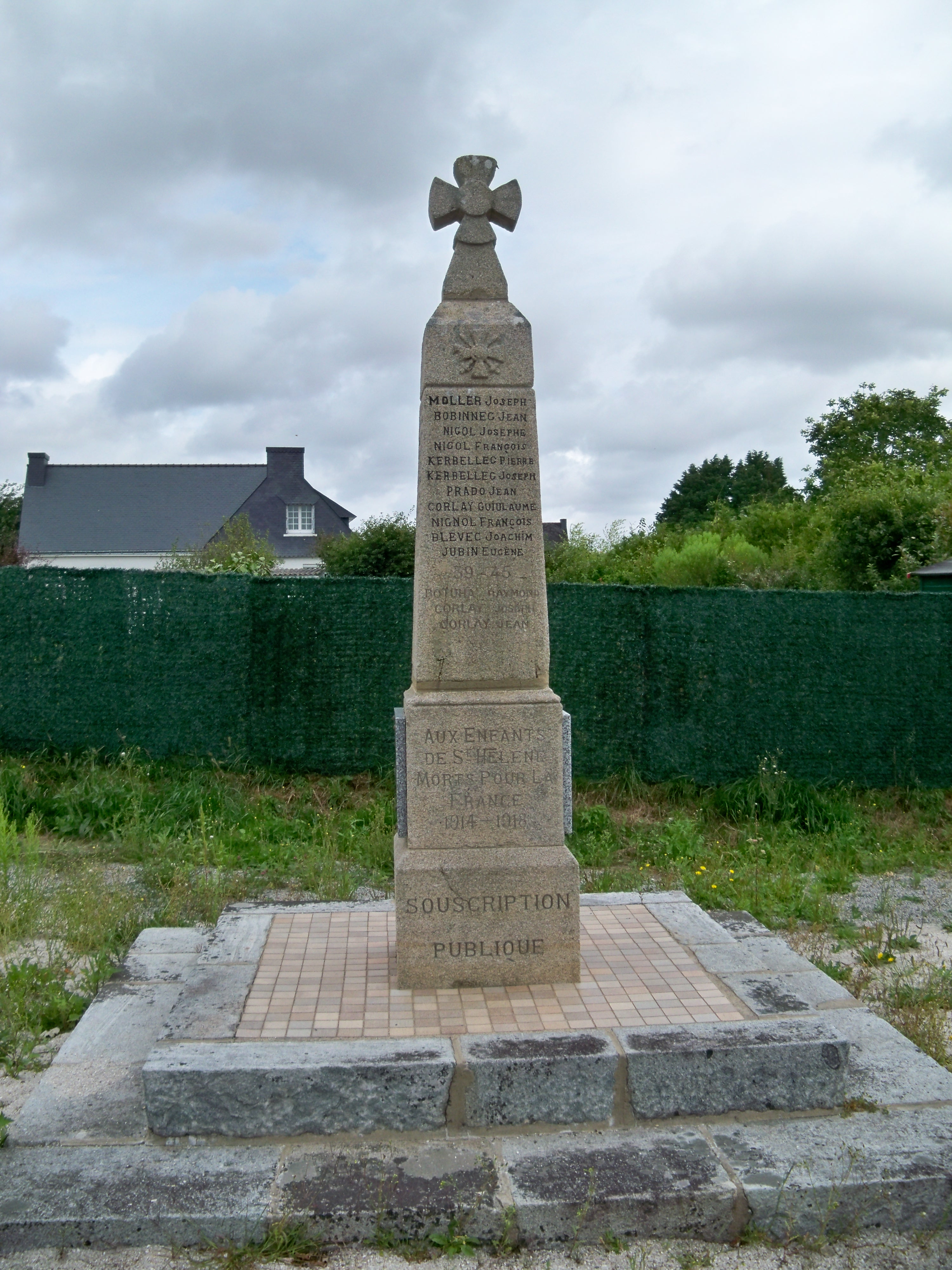 Le Monuments aux morts de Sainte-Hélène, dans le Morbihan